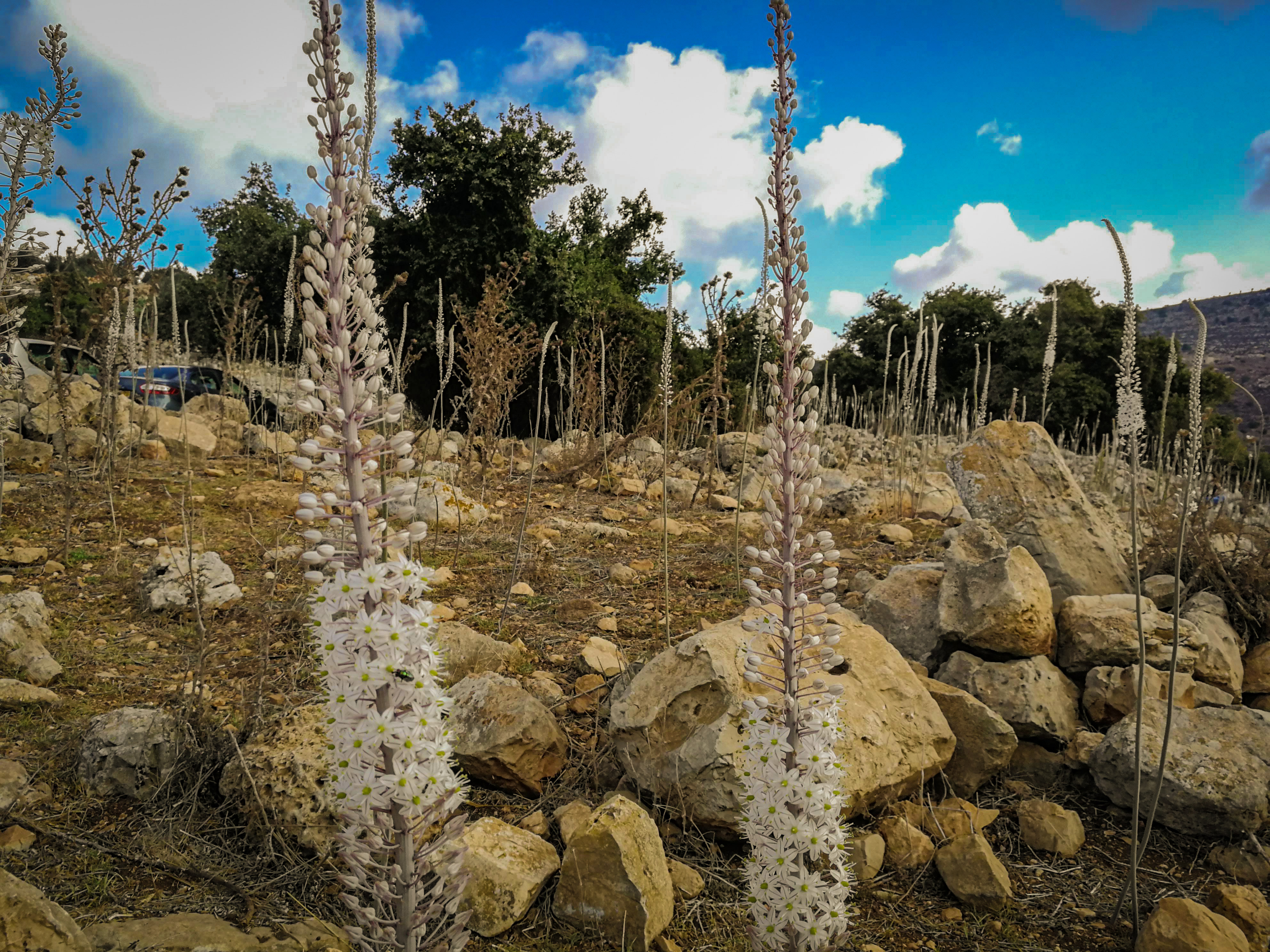 חצבים בתל ידפת ספטמבר 2018